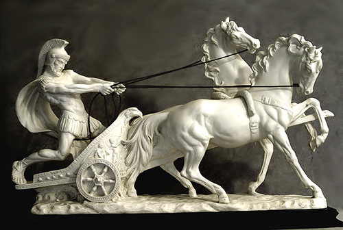 Гай Апуллей Діокл - знаменитий візник свого часу у Стародвньому Римі.